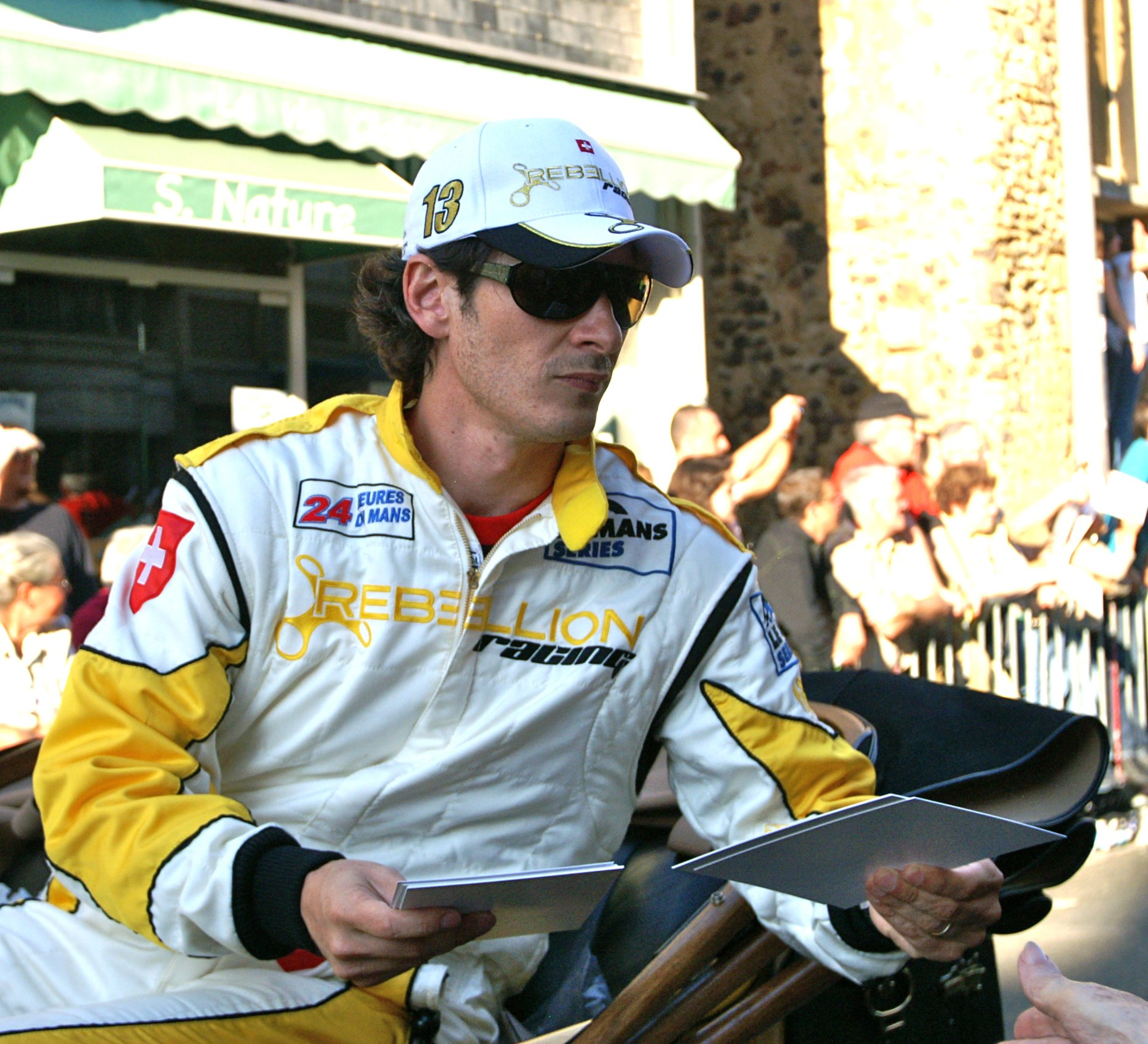 Le Mans 2010, Drivers' Parade